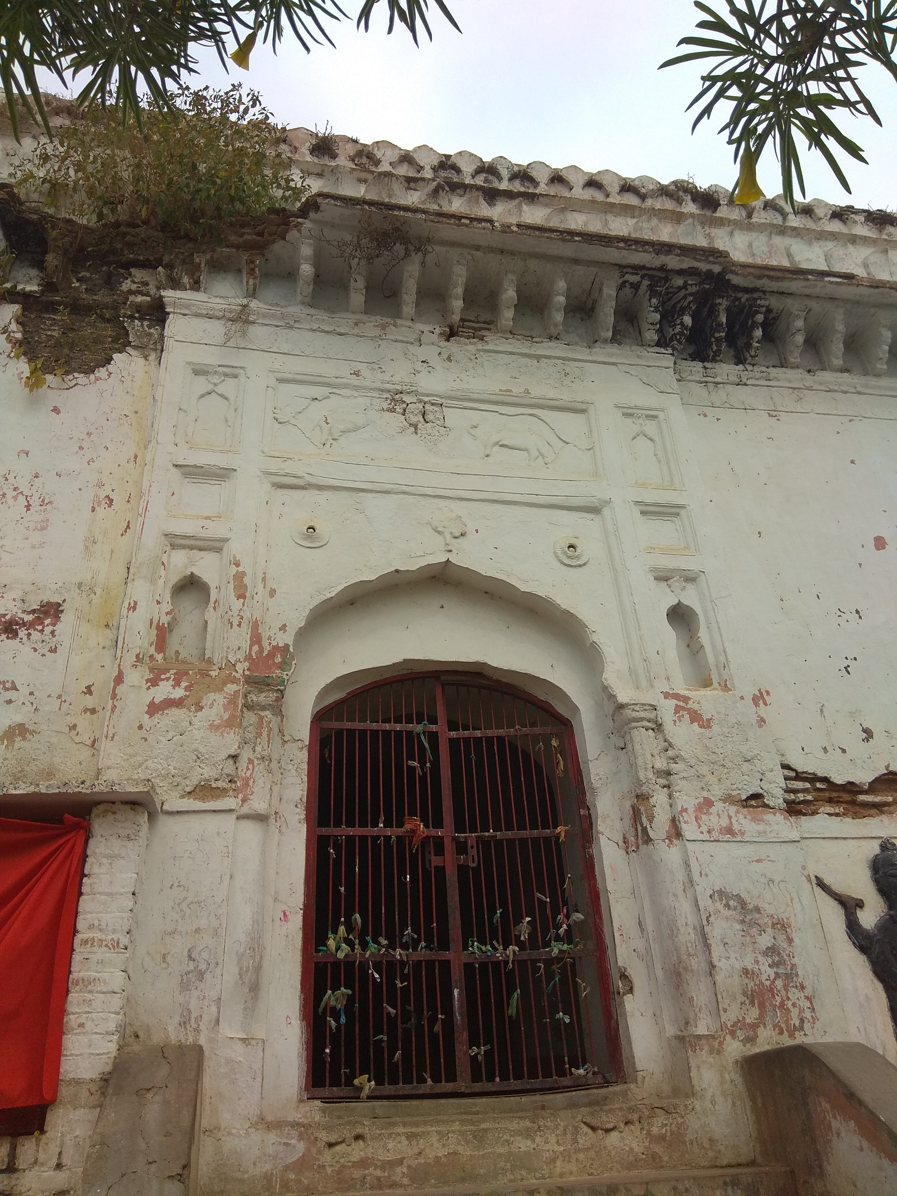 दरवाजा